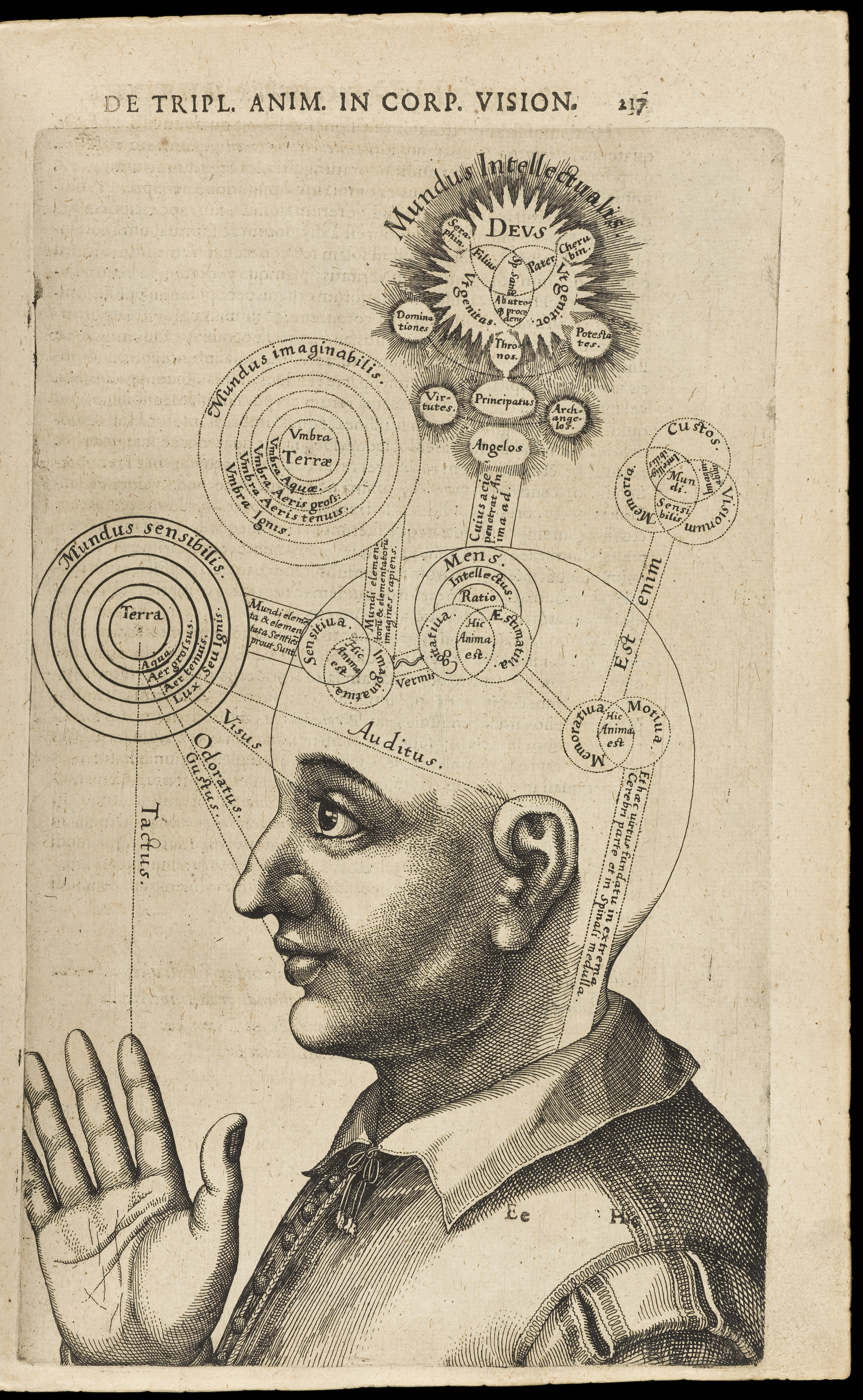 Tomus secundus ... de supernaturali, naturali, praeternaturali et contranaturali microcosmi historia, in tractatus tres distributa. [Tomi secundi tractatus primi, sectio secunda, de technica microcosmi historia. Tomi secundi tractatus secundus, de praeternaturali utriusque mundi historia] Mental faculties Medical Photographic Library